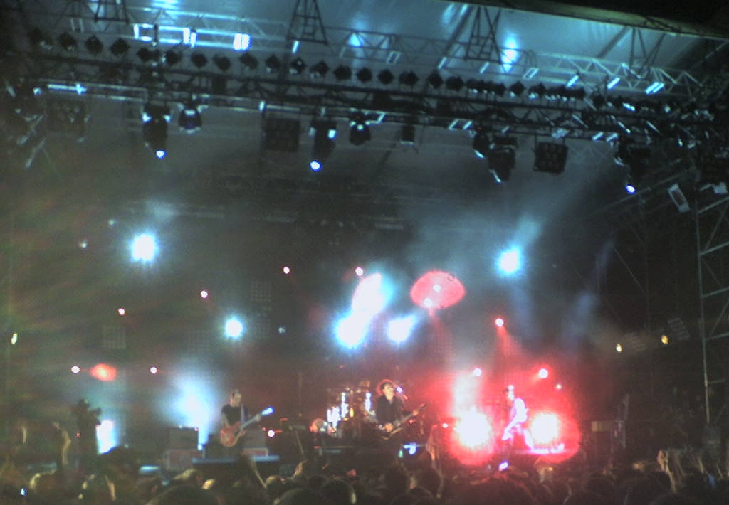 The Cure en concert à la Route du Rock (Saint-Malo) le 14 Août 2005